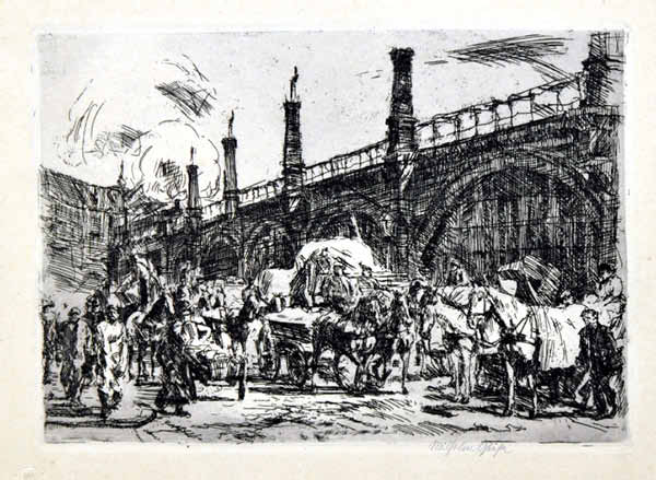 Wilhelm Giese Bei den Markthallen unter der Hochbahn. Berlin